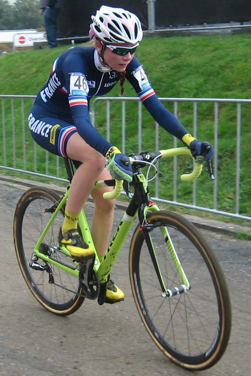 Évita Muzic in de wereldbeker veldrijden op de Cauberg in Valkenburg, Nederland, op zondag 23 oktober 2016.